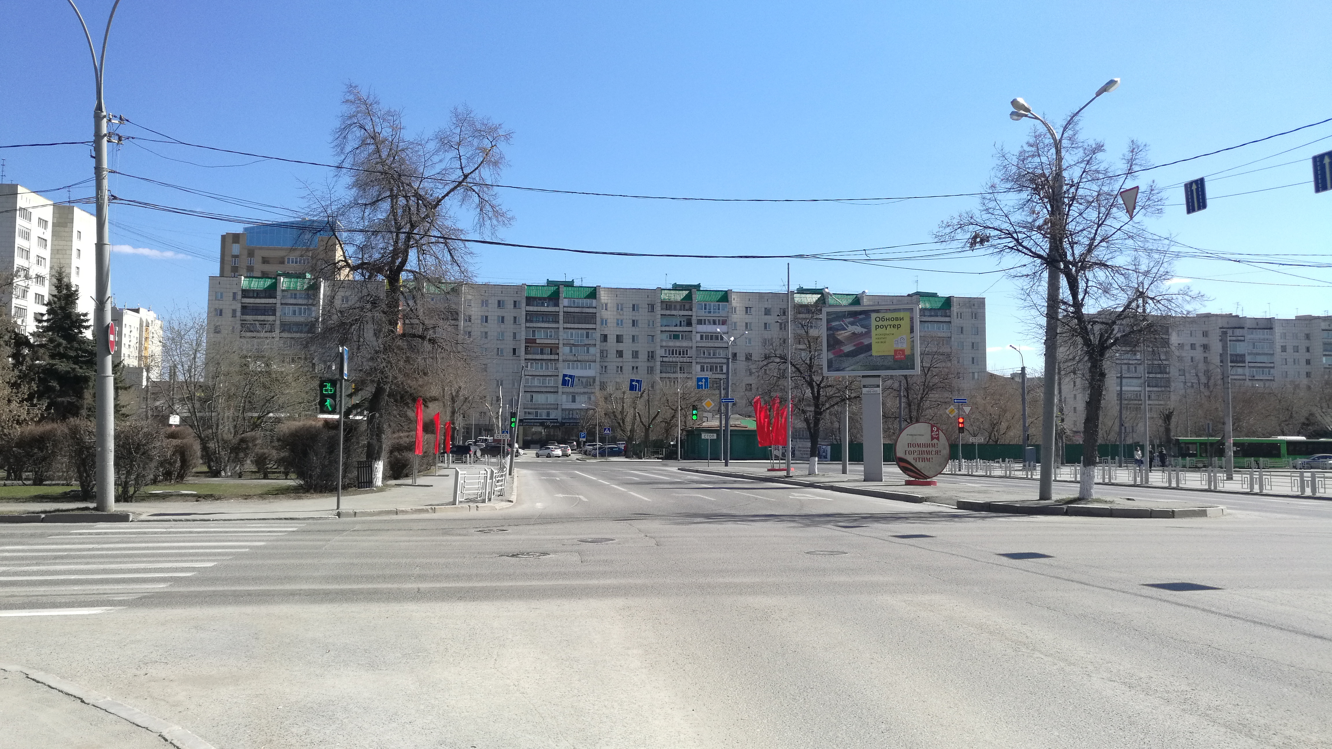 Strato Lenin. Tjumeno, Rusio.